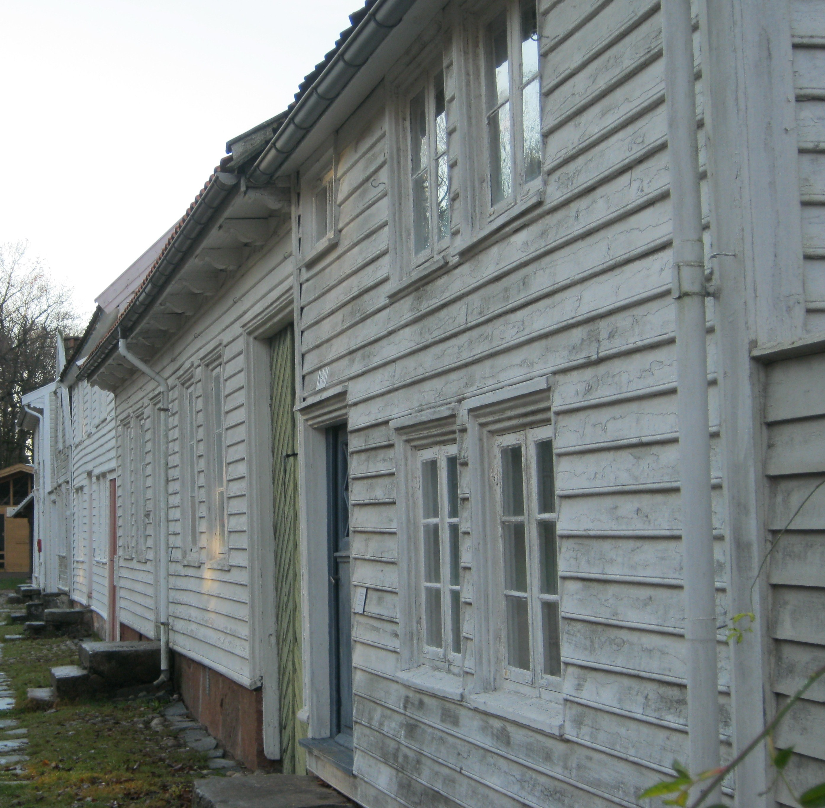 Bygada Vest-Agder-museet Kristiansand